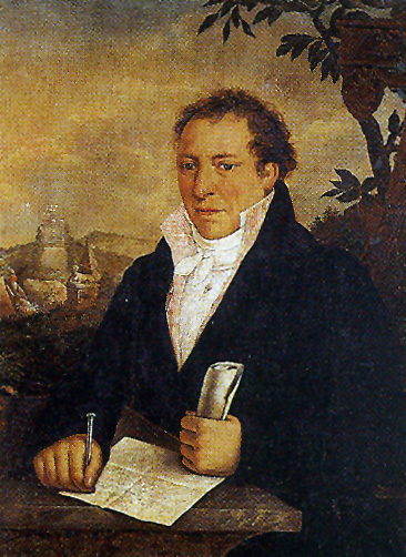 Nikolaus DuMont, Kölner Bürgermeister, Ausschnitt aus einer Illustration